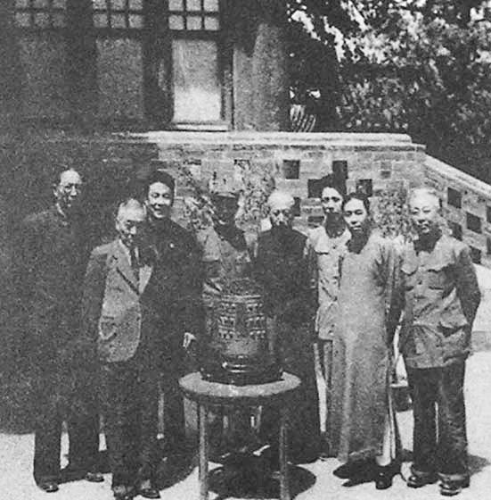 中华人民共和国建国初期的某次文物捐献仪式，左起：郑振铎、马衡、王冶秋、郭沫若、文物捐献者、周扬、沈雁冰、丁西林。